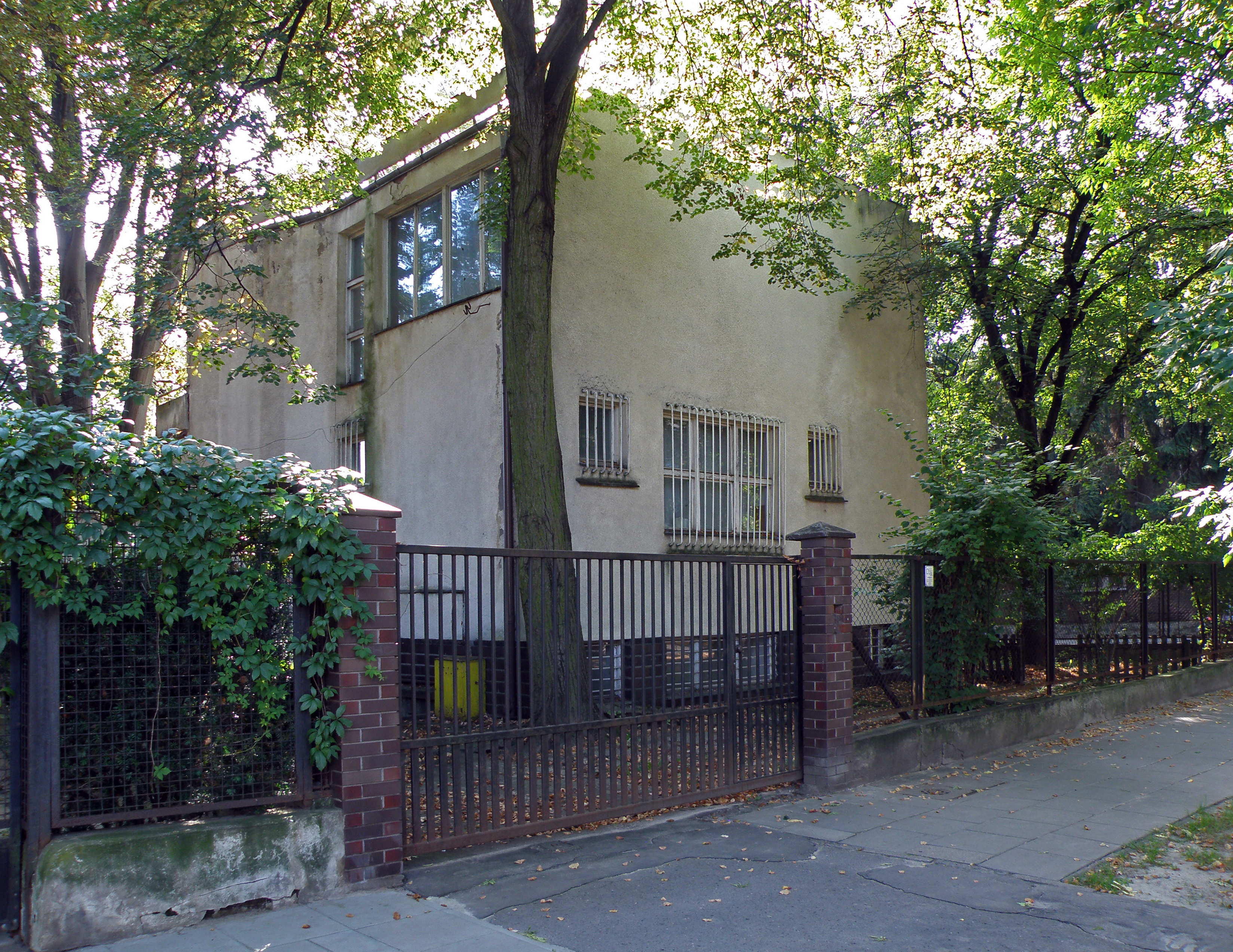 Willa, ok. 1925, ul. Katowicka 26 (1358-A z 28.09.1988), Warszawa.